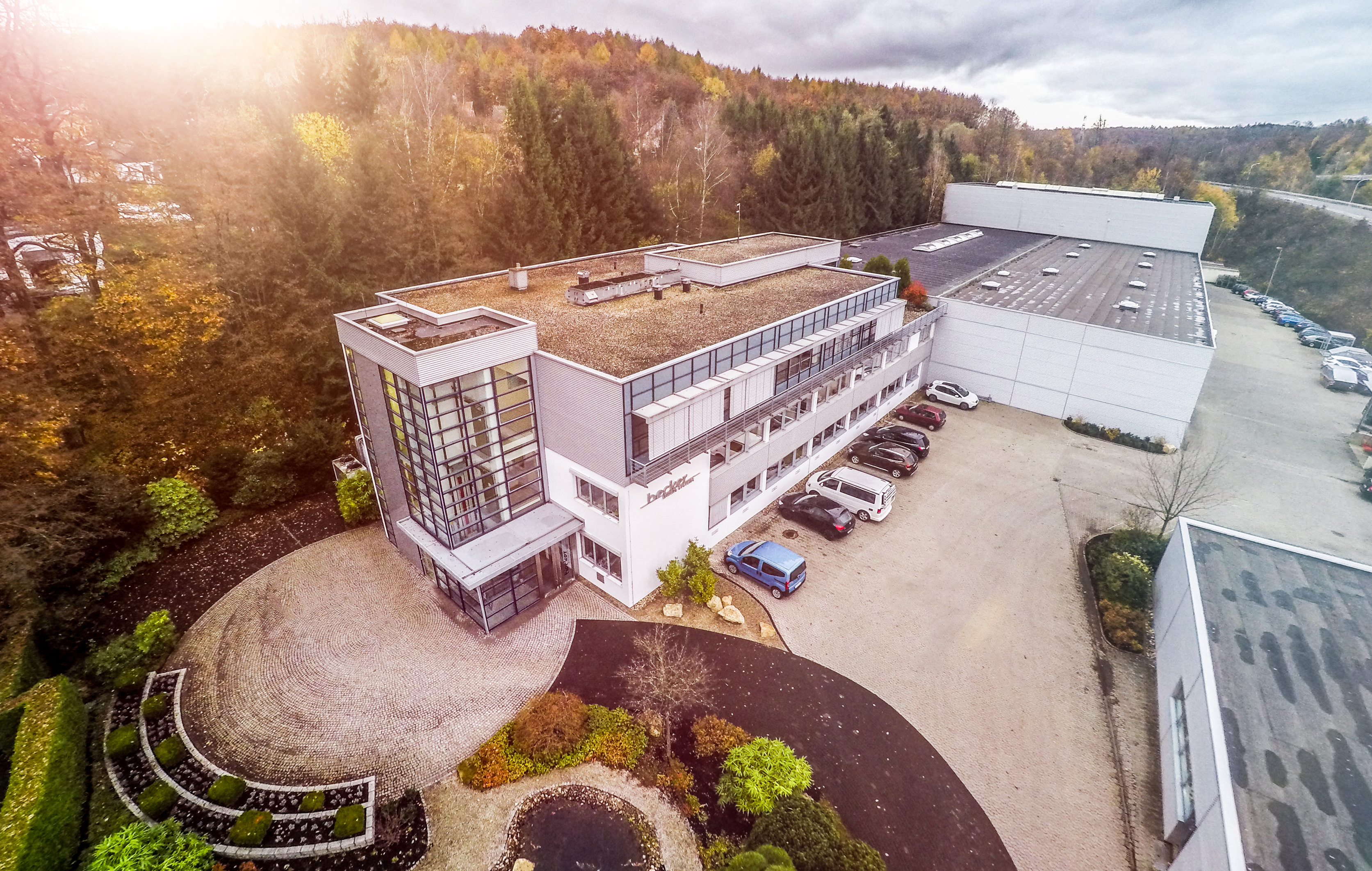 Becker Mining Systems AG Firmensitz Luftaufnahme in Friedrichsthal